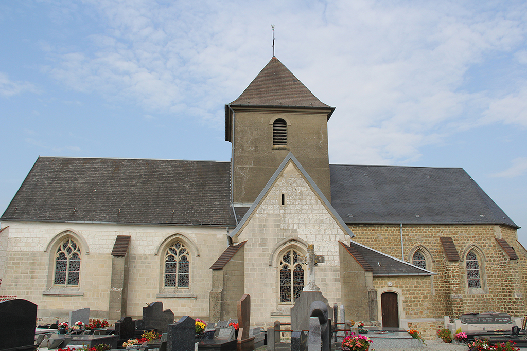 Verlincthun église